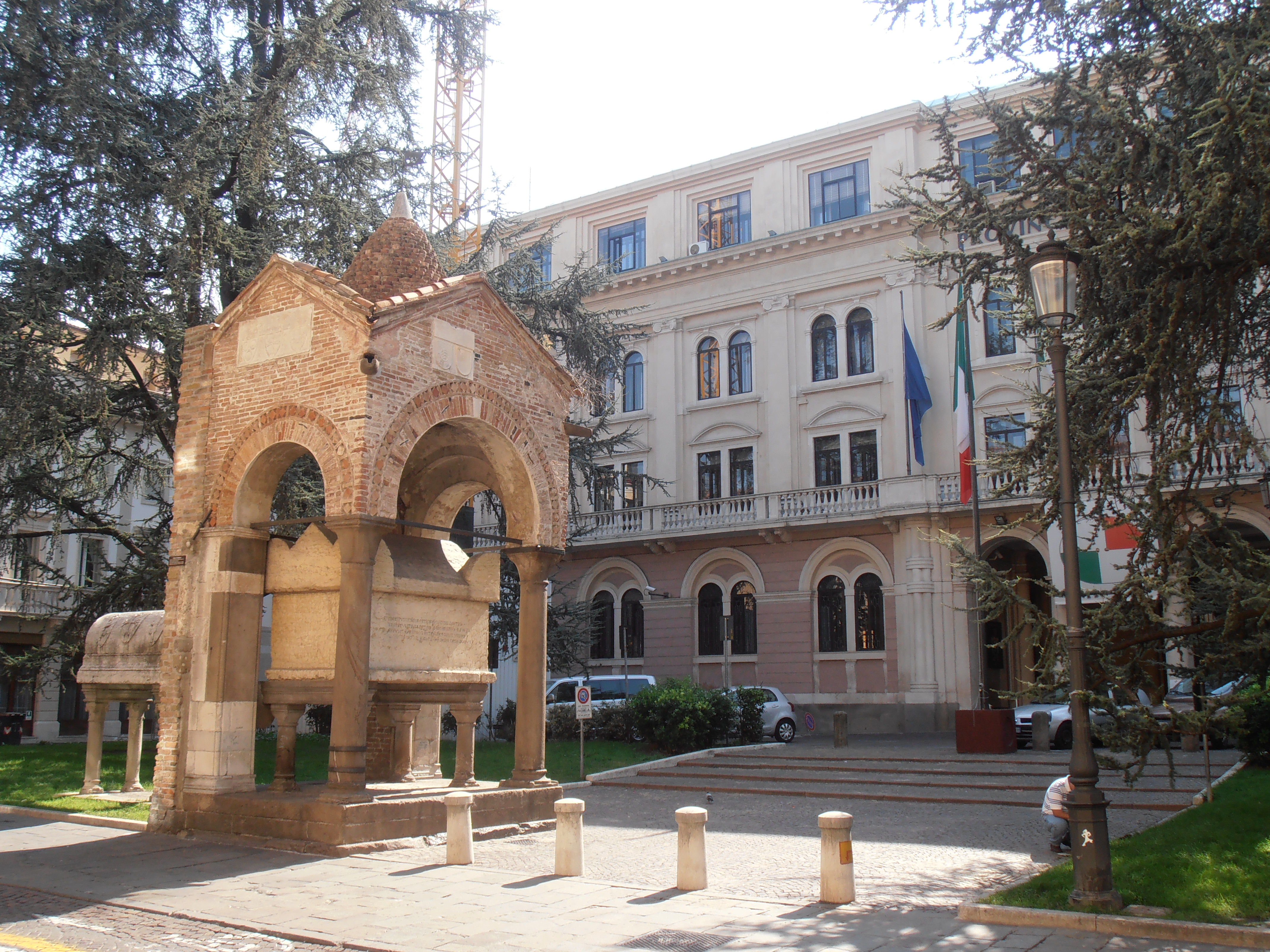 Italie - Padova - Tomba di Antenore